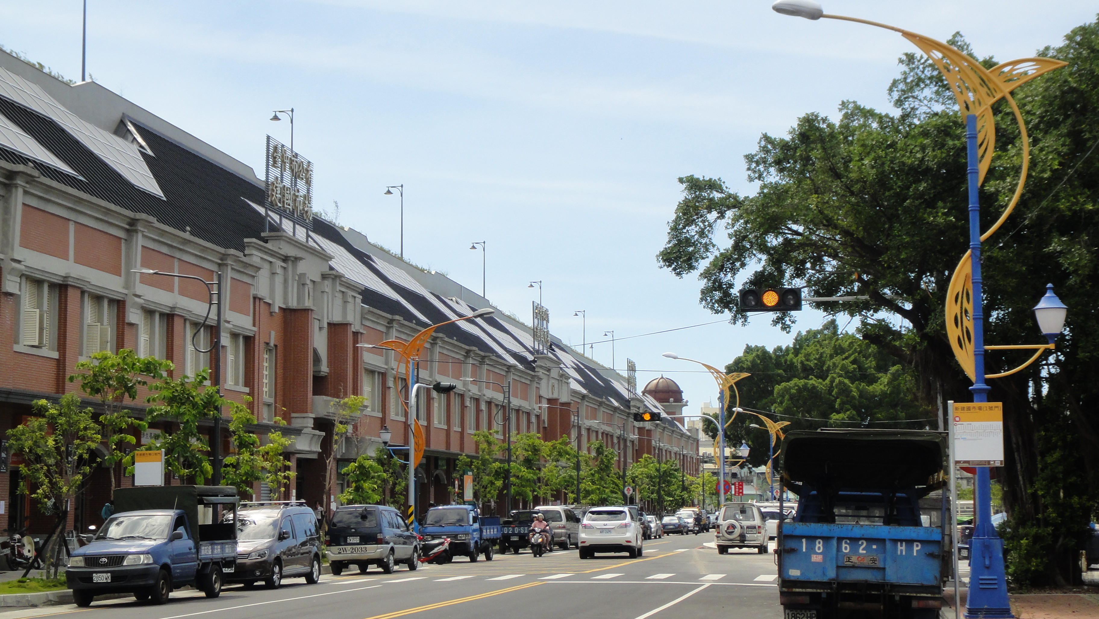 中文（台灣）: 新建國市場開幕~~